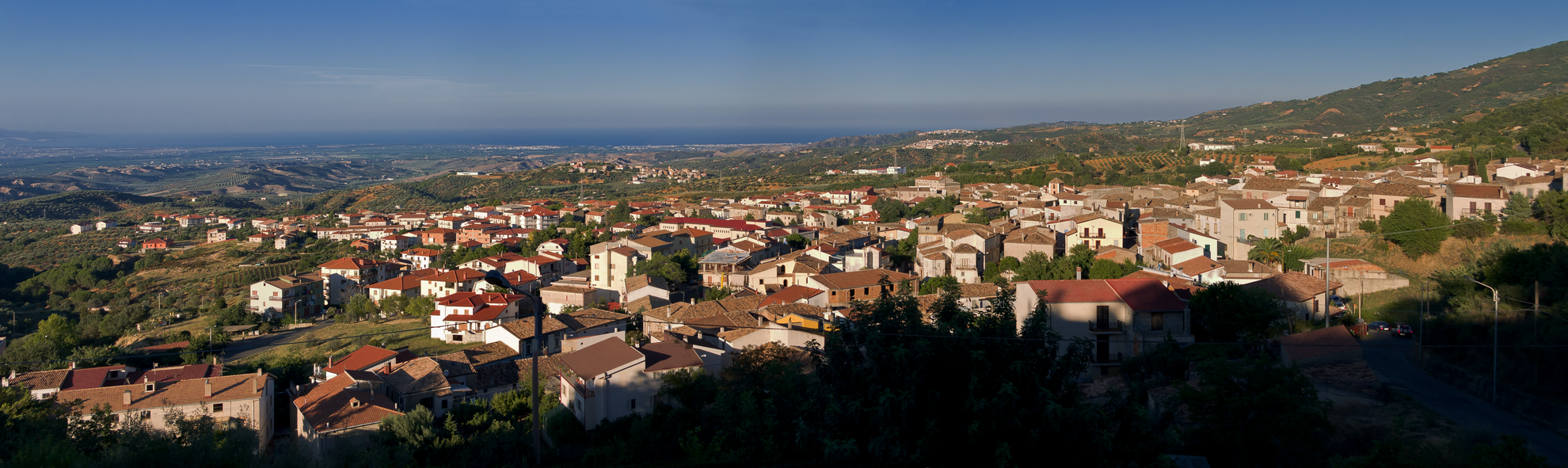 San Demetrio Corone da "Via Panoramica"